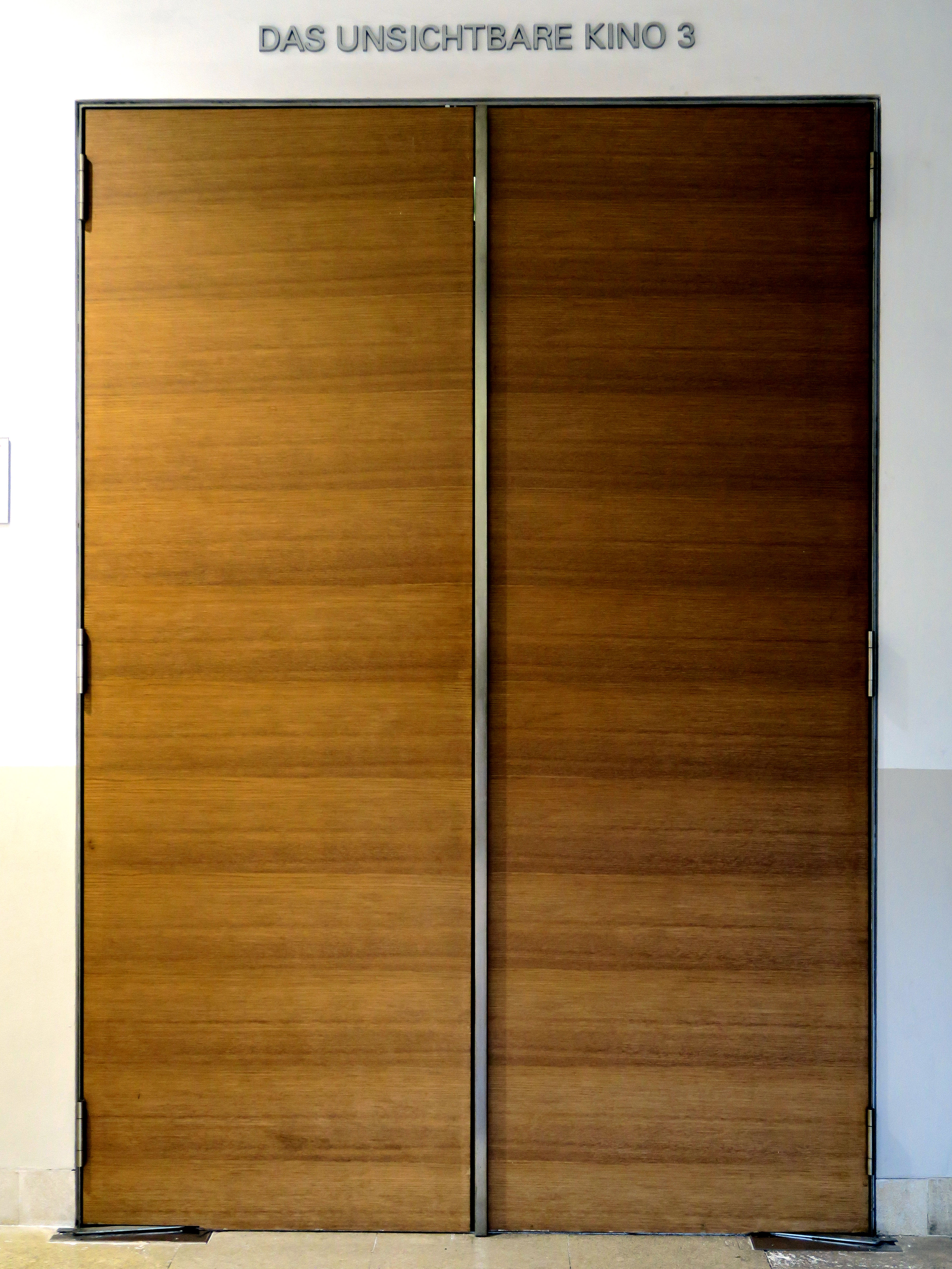 Eingang zum "Unsichtbaren Kino 3" mit benennender Schriftzeile über der Tür